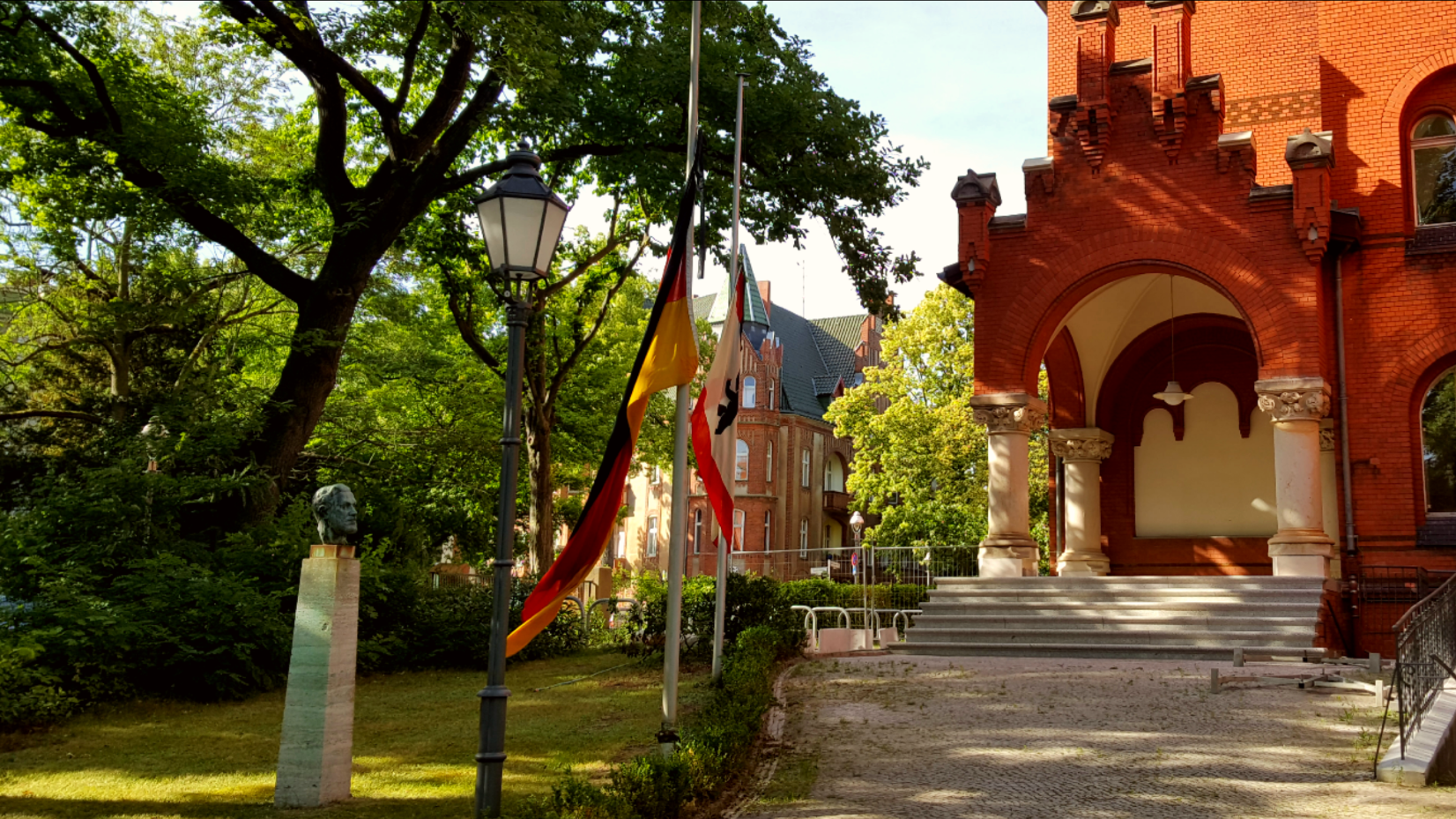 Eingang des Lilienthal-Gymnasiums in Berlin-Lichterfelde mit Büste von Otto Lilienthal